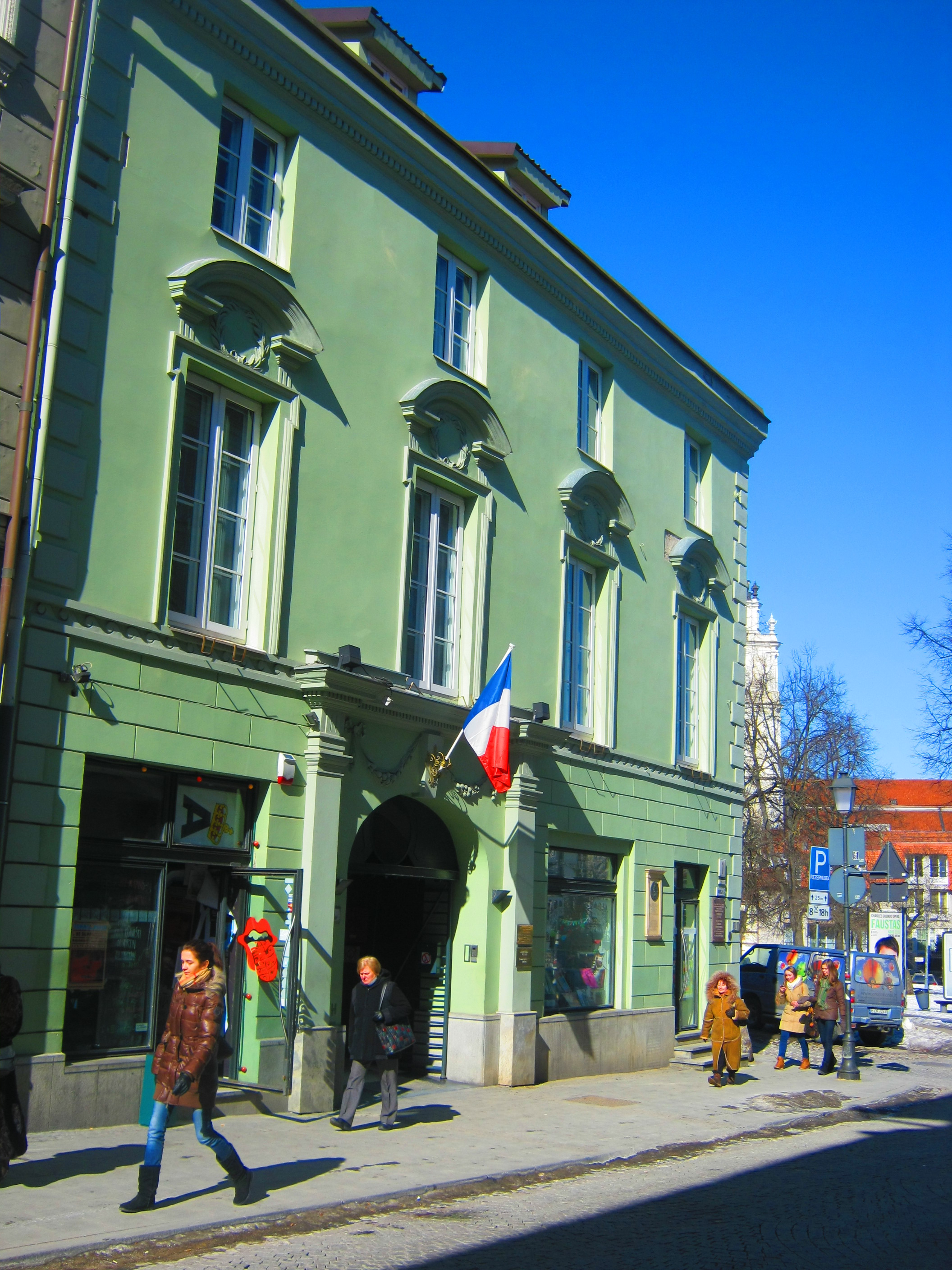 Didžioji g. 1, Vilnius